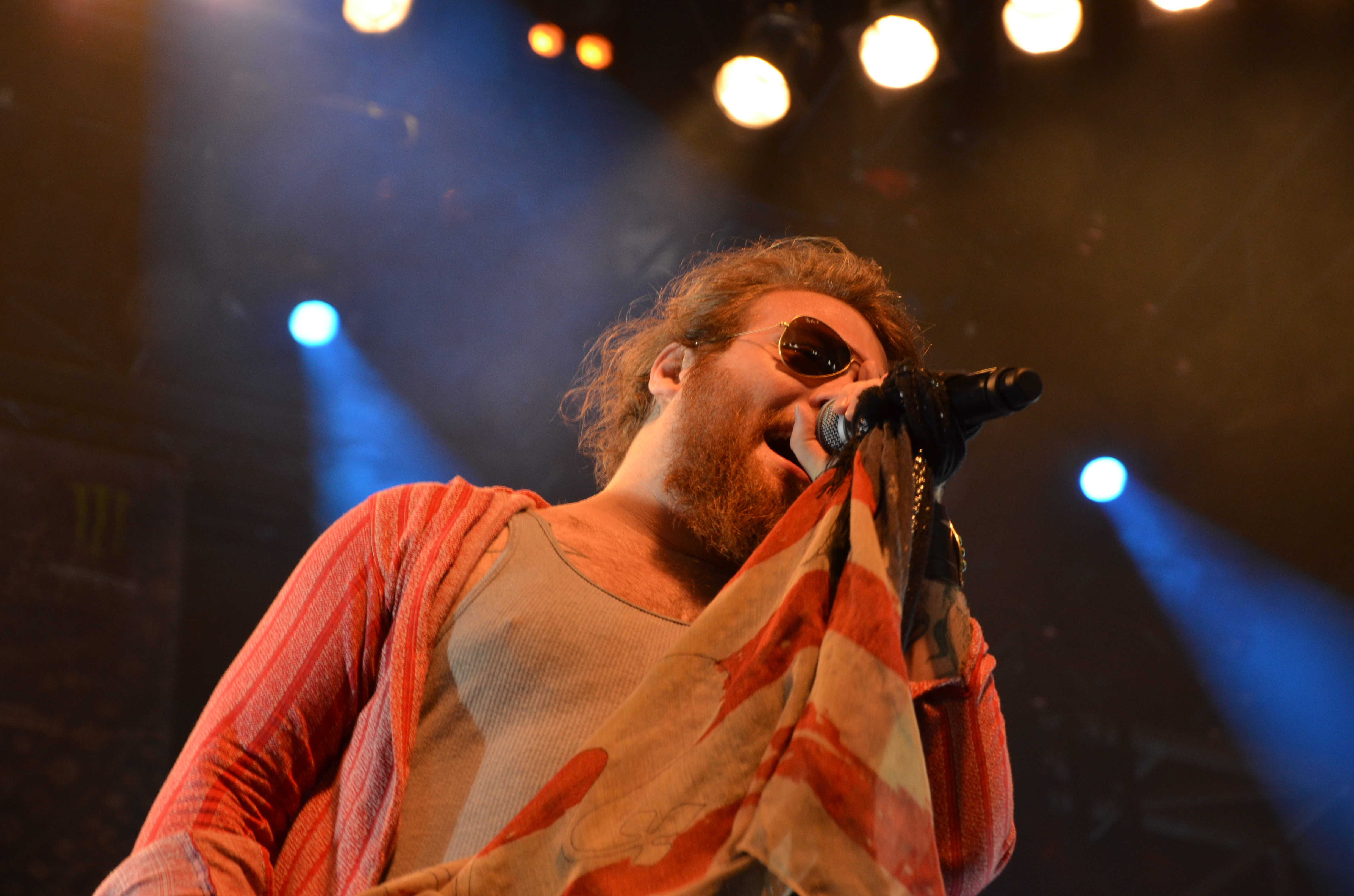 Danny Worsnop von We Are Harlot bei Rock am Ring 2015.